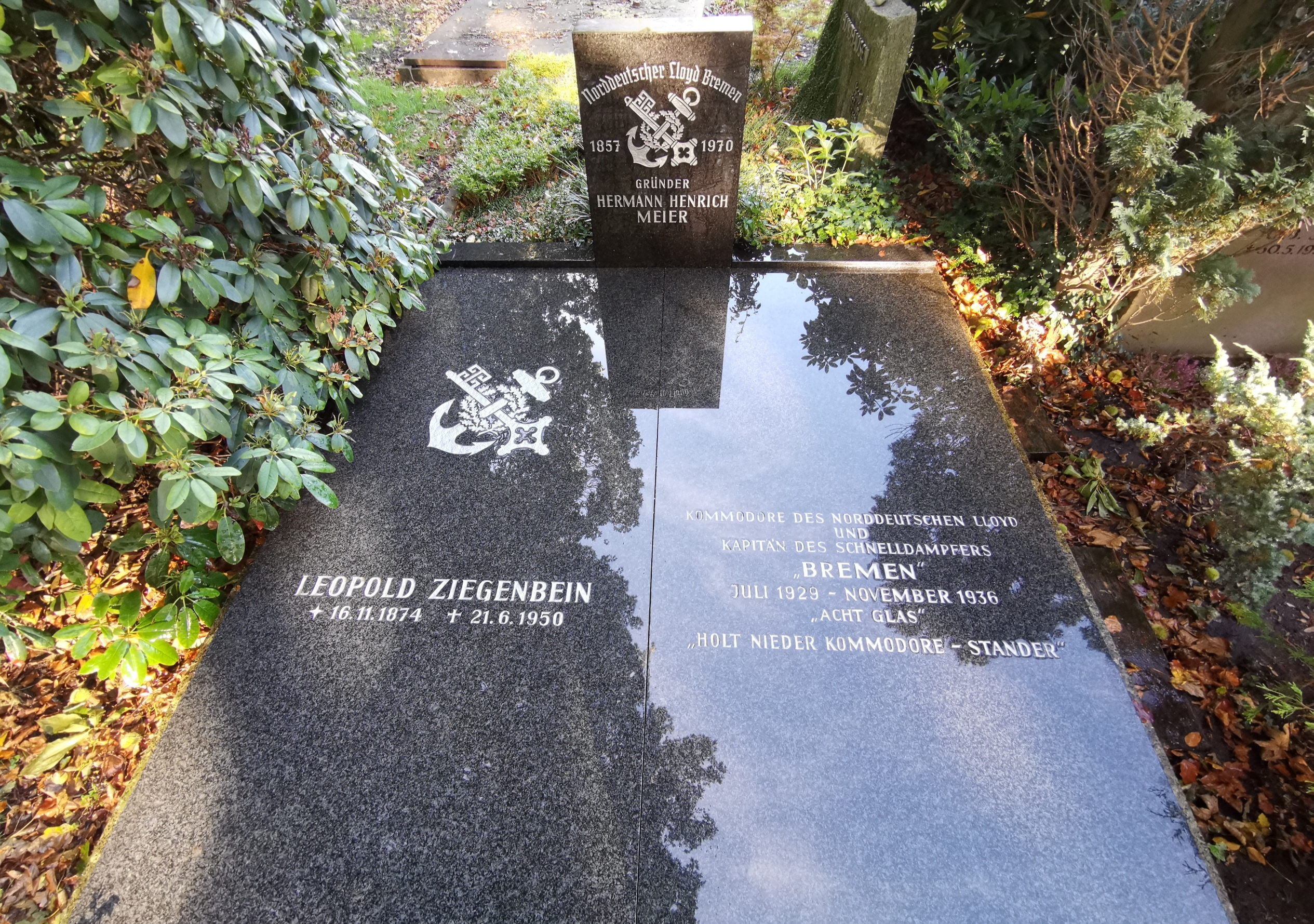 Maritimen Ehrenruhestätte in Geestland